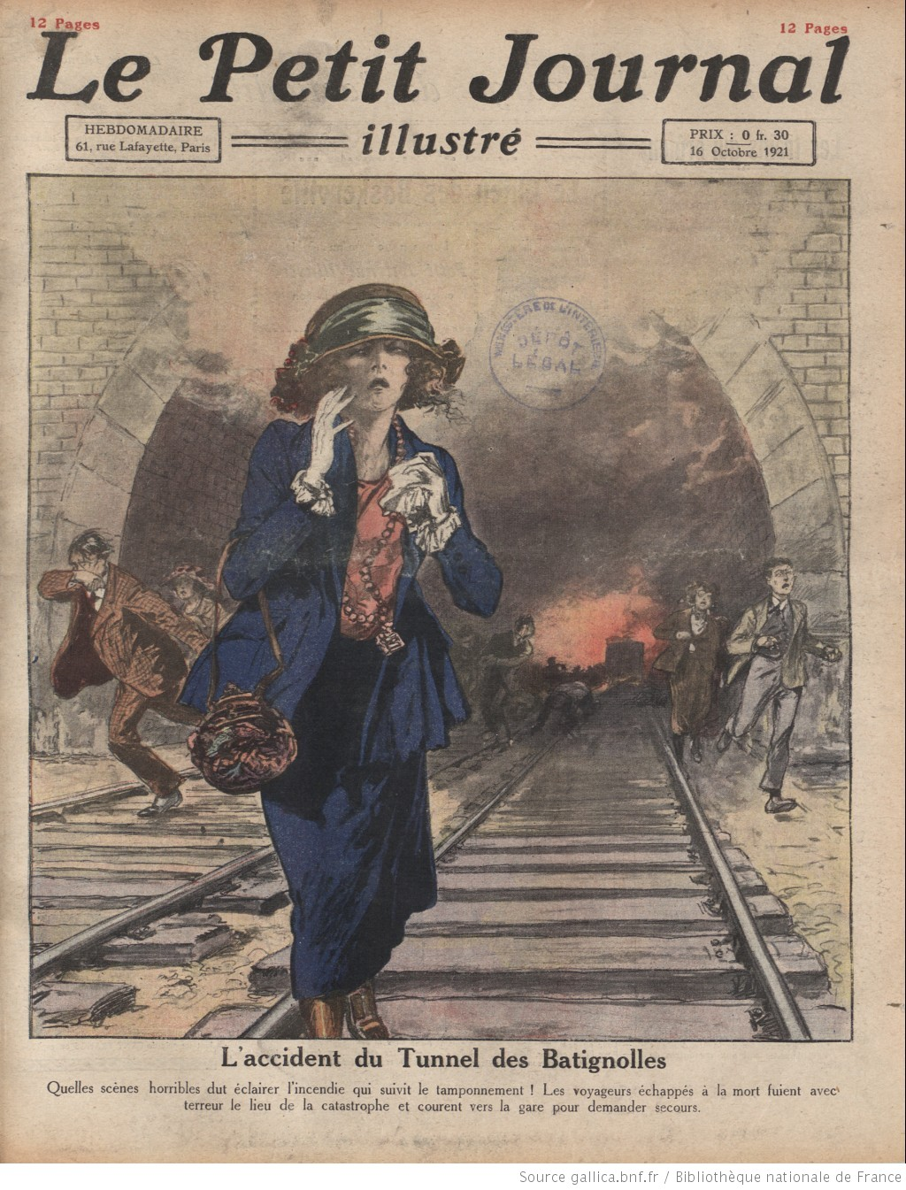 Des passagers apeurés sortent en courant du tunnel des Batignolles après l'accident qui vient d'avoir lieu le 5 octobre 1921 (illustration du Petit Journal illustré du 16 octobre 1921).